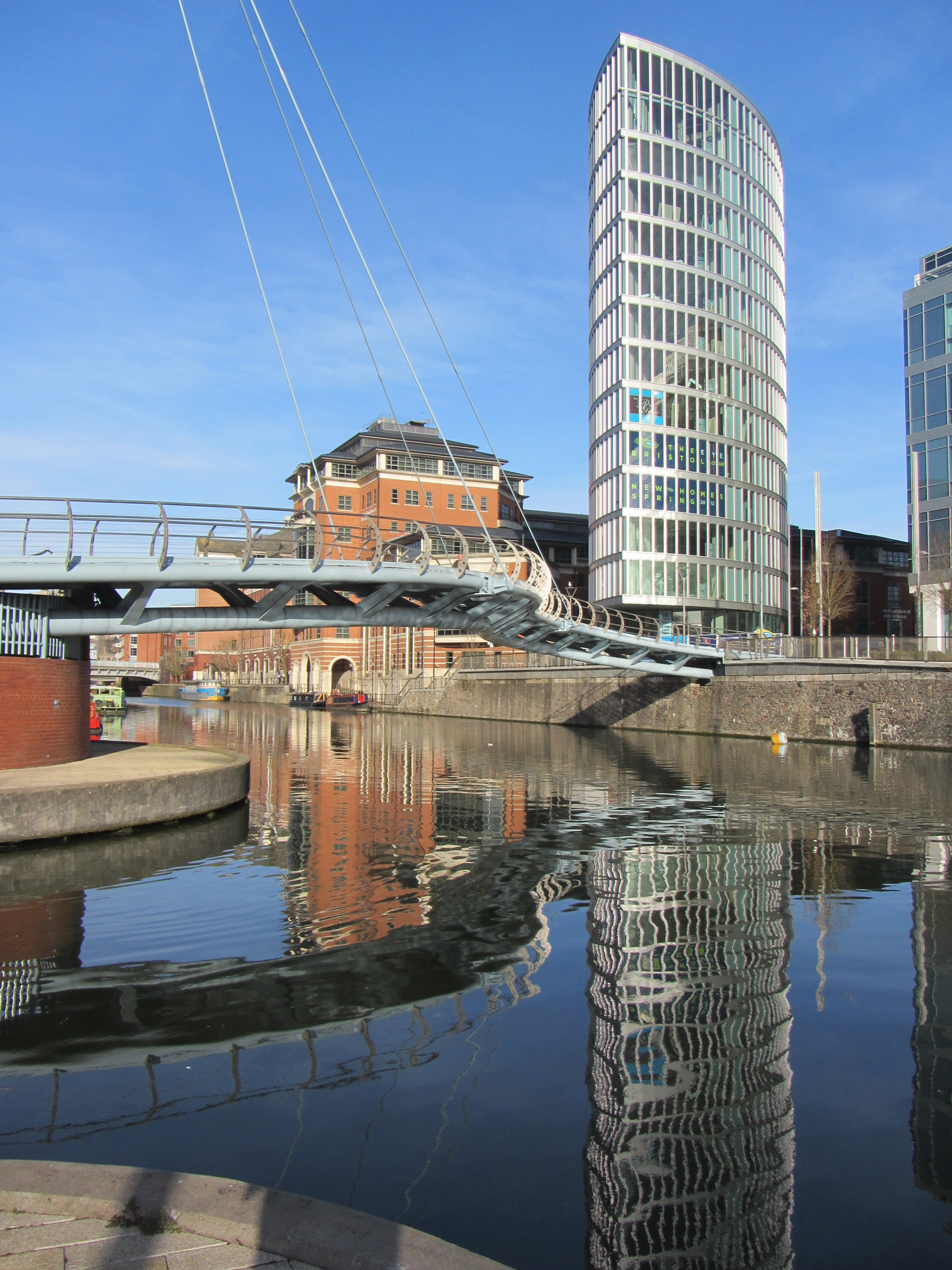 Reflections - Temple quay - Feb 2012